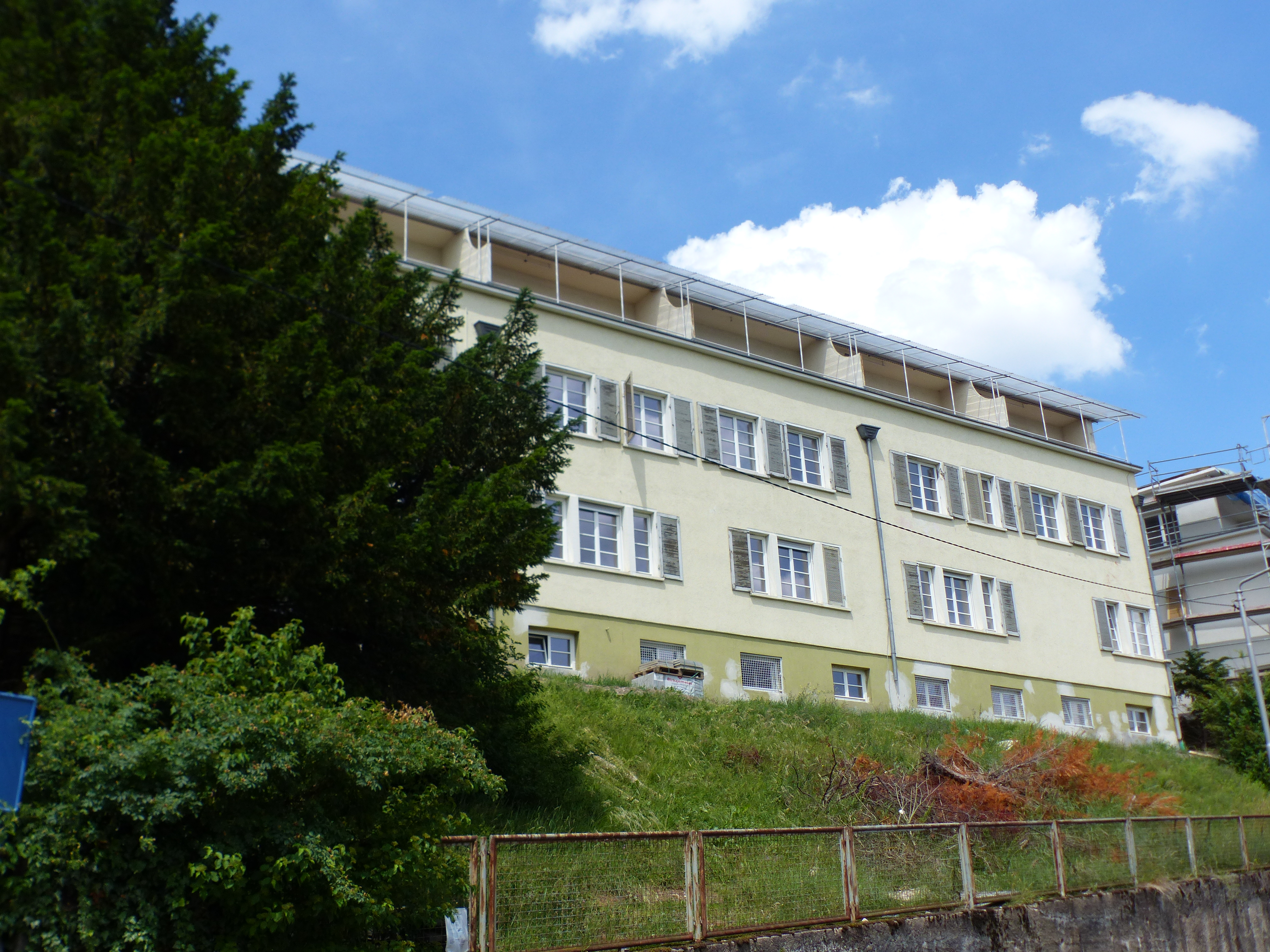 Reihenhaus, Sperlingstraße 36, 38, 40, 42, 44, 46, Stadtteil: Südheim, Stadtbezirk: Süd, Stadt: Stuttgart, Land: Deutschland